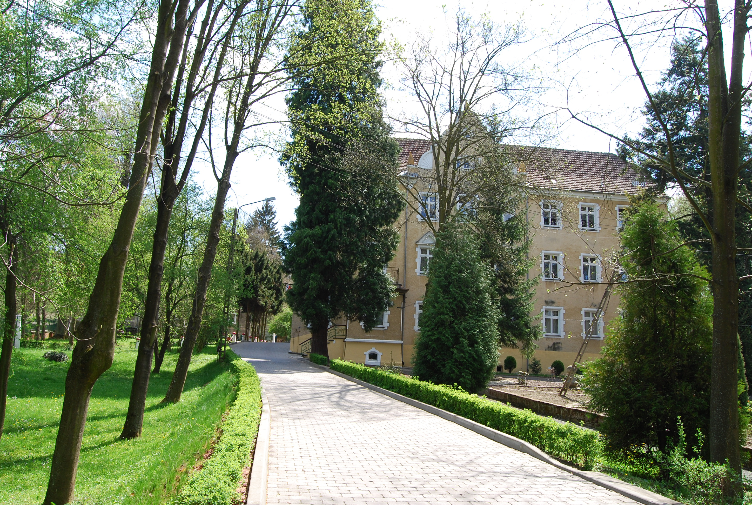 Pałac w Nielestnie, obecnie Dom Pomocy Społecznej. Gmina Wleń, woj. dolnośląskie